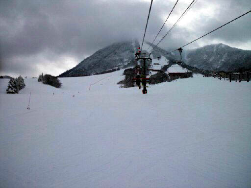 木島平スキー場 NTTドコモF-12Cで撮影